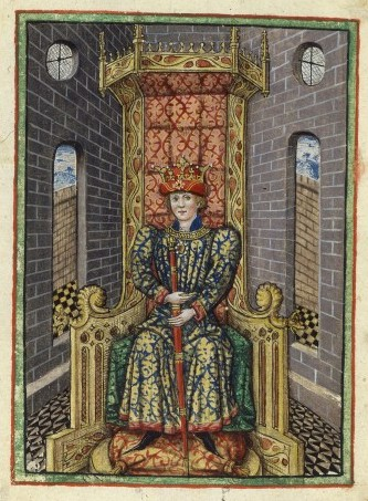 Pierre IV d'Aragon